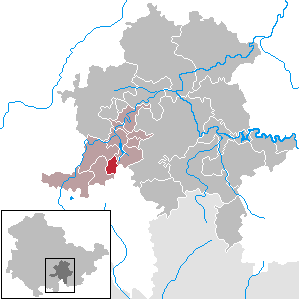 Deesbach in Thuringia - District Saalfeld-Rudolstadt